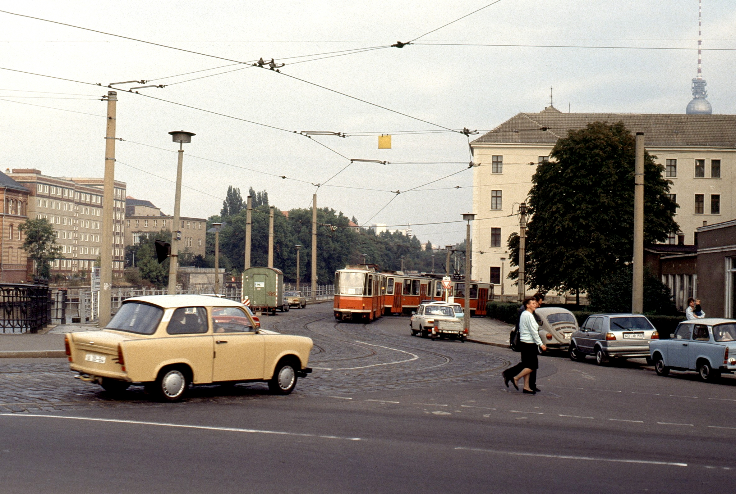 Am Weidendamm Berlin 1991